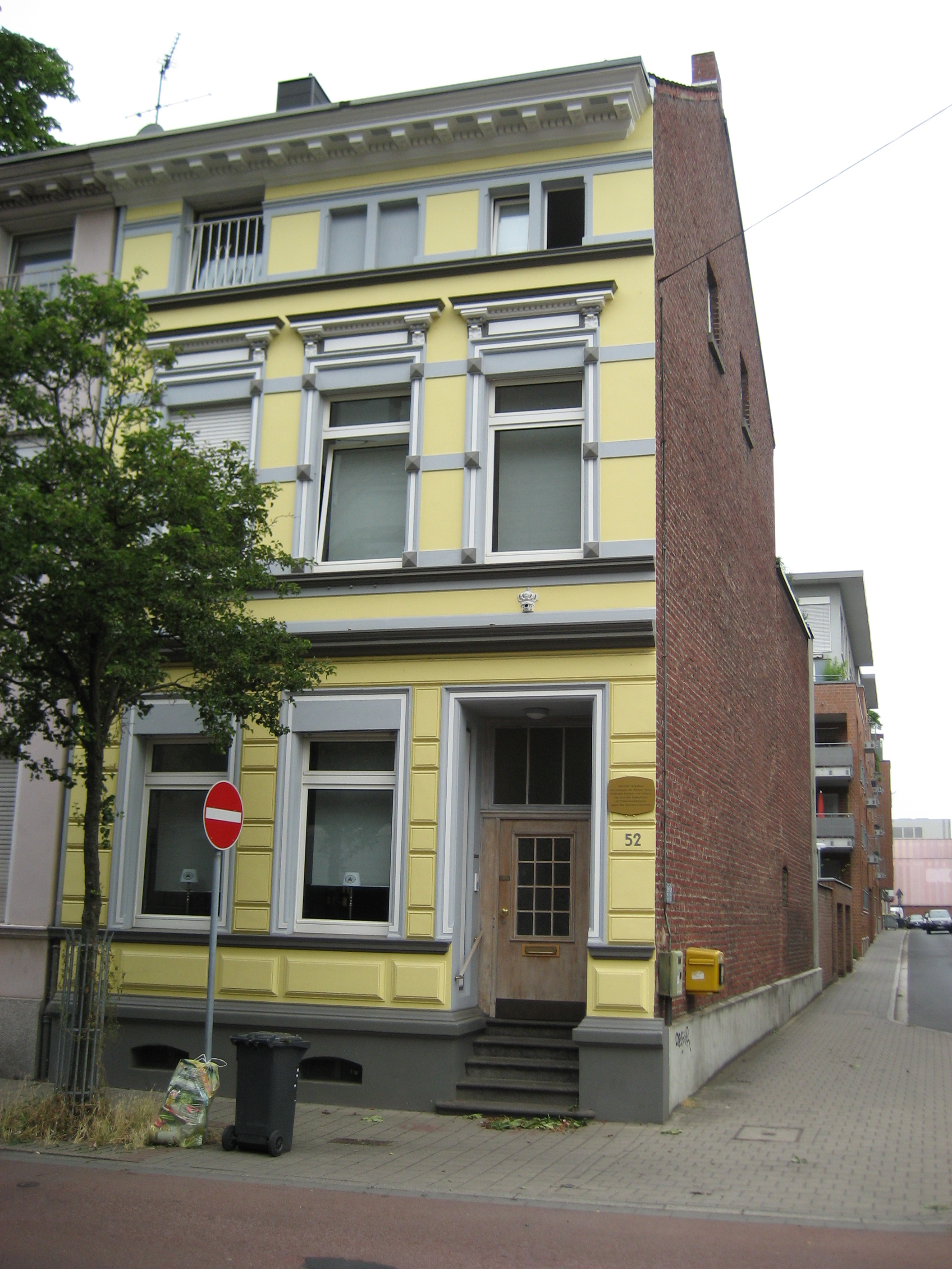 Wohnhaus des Landrats von Lüninck (+1944) von 1918 bis 1922.